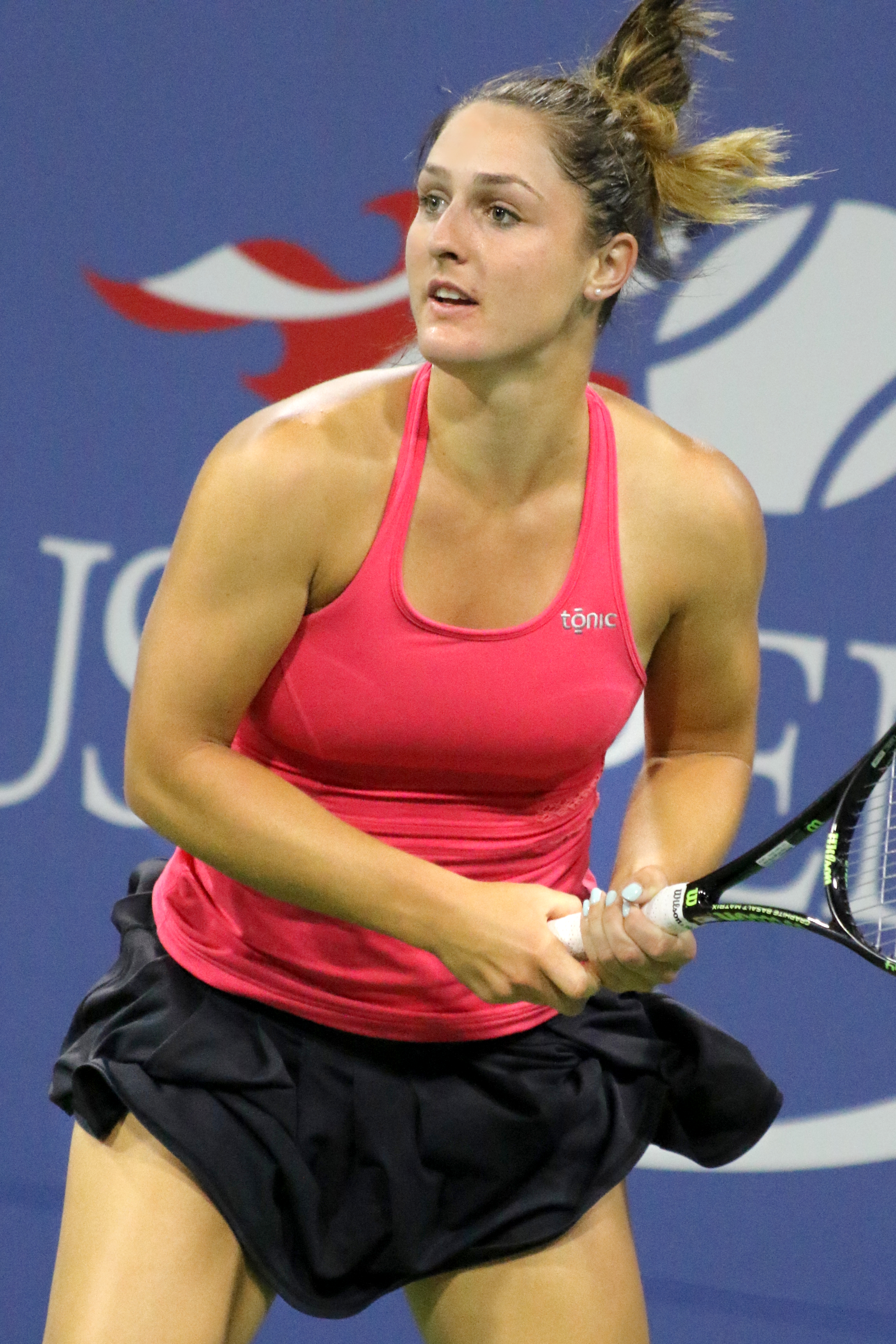 Dabrowski US16 (62)